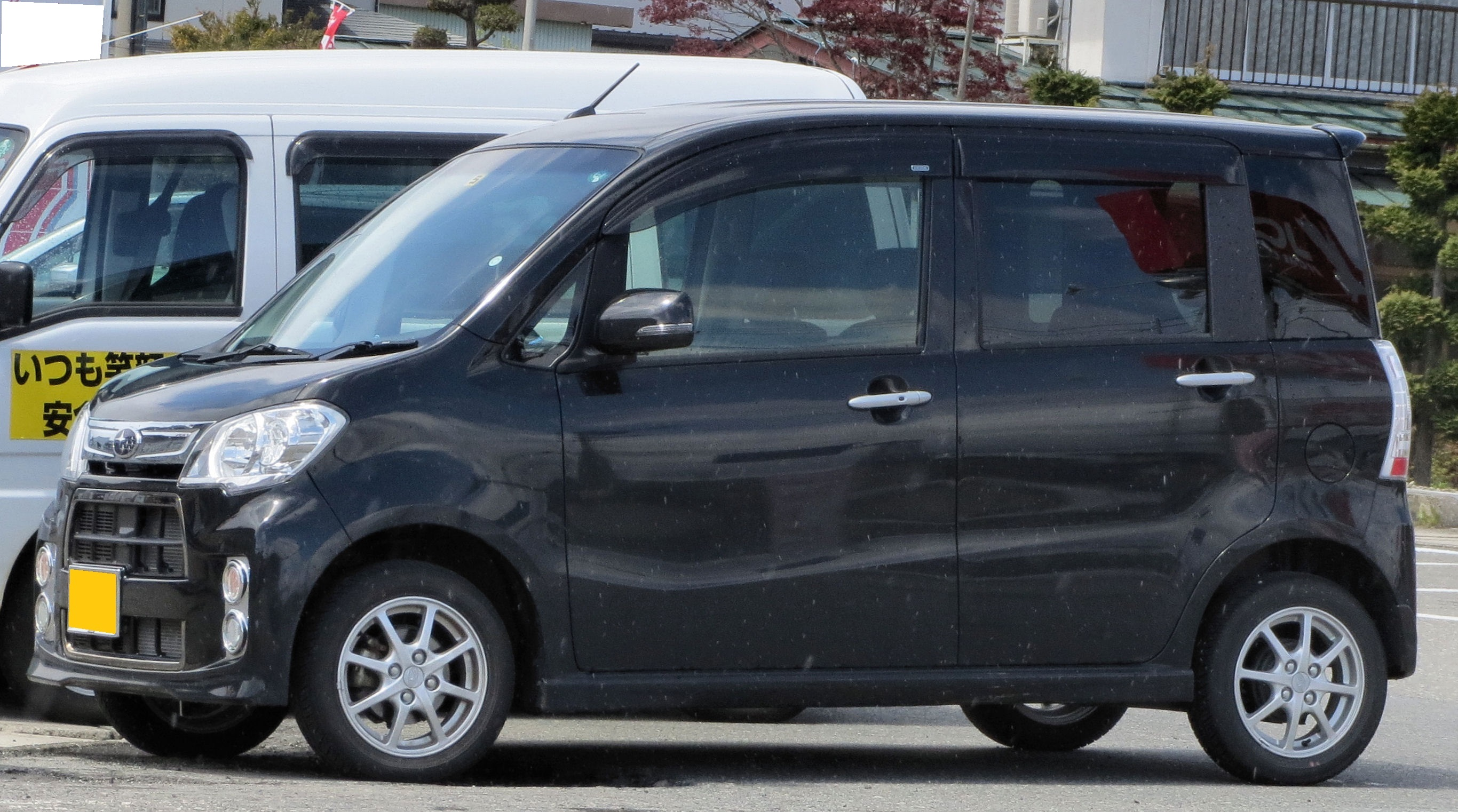 スバル・ルクラ Rリミテッド